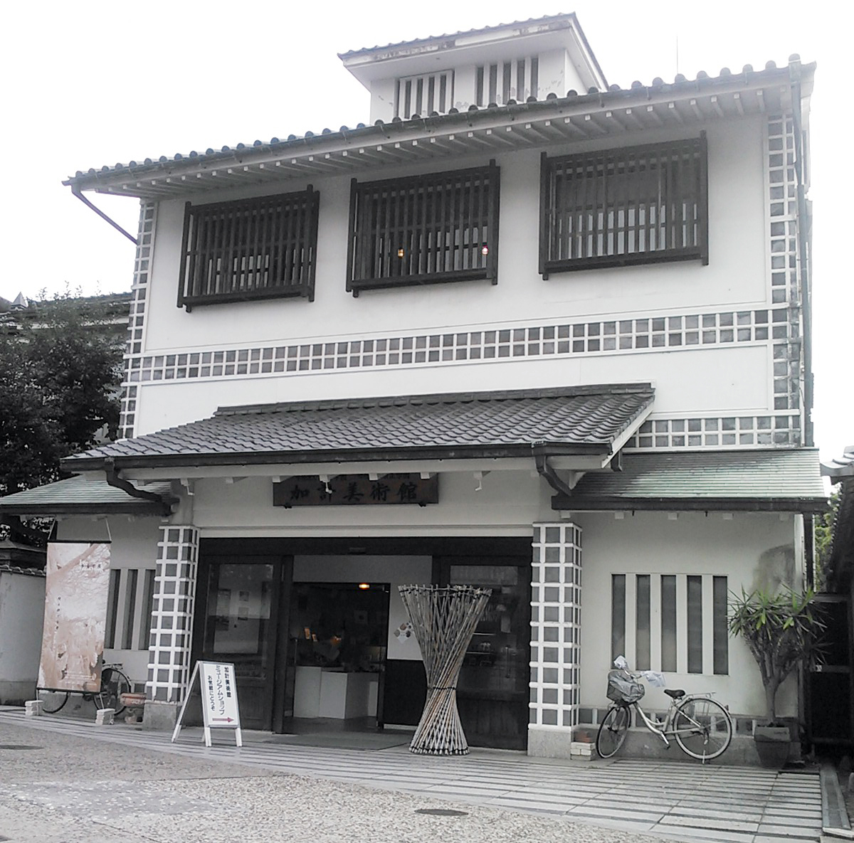 岡山県、倉敷美観地区、加計美術館。投稿者本人による撮影。